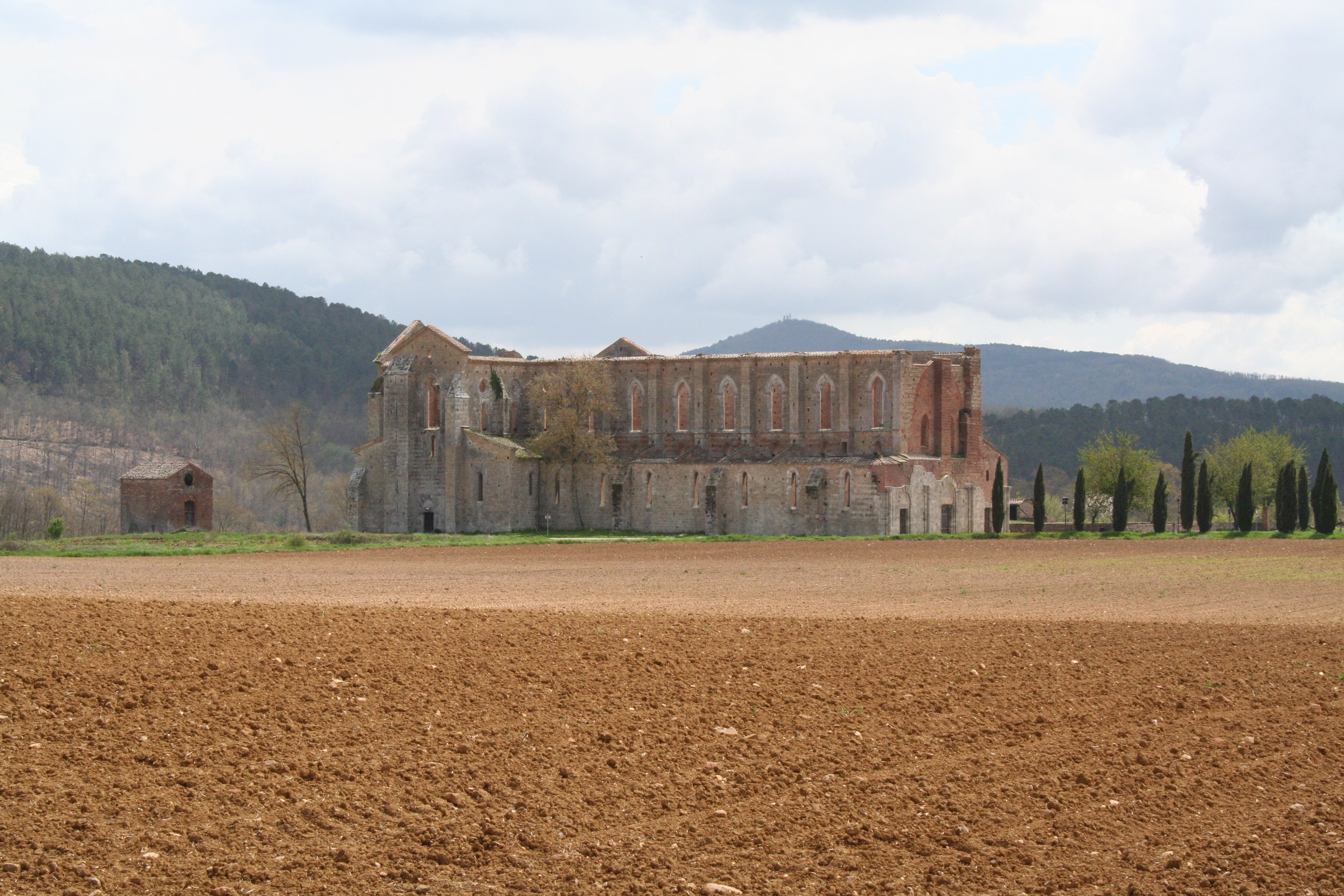 Abtei von San Galgano